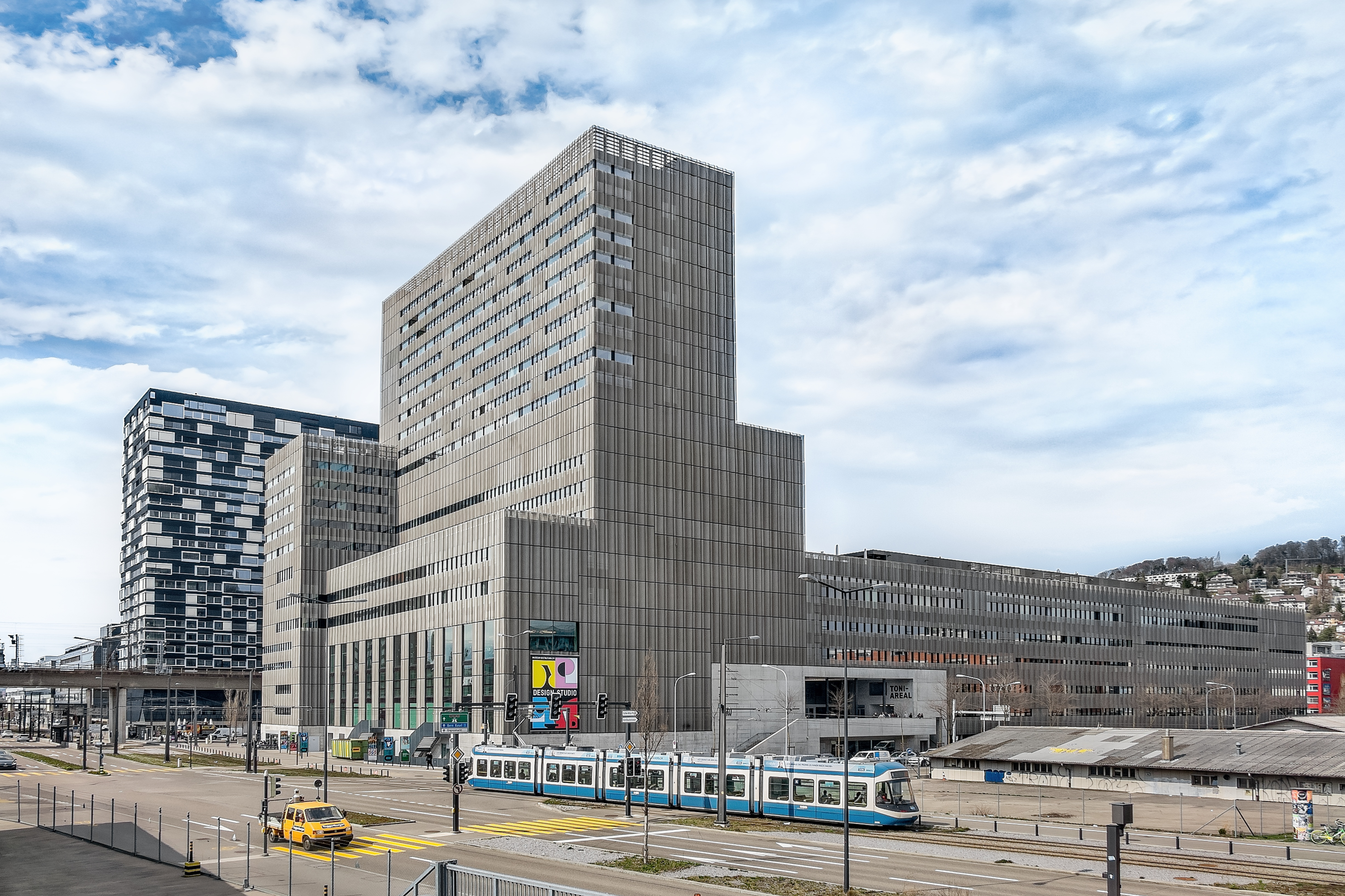 Zürcher Hochschule der Künste. Schaudepot, Museum für Gestaltung Zürich. Gebäudehöhe 75 Meter mit angrenzendem Flachbau. Toni-Areal. Pfingstweidstrasse 94, 8005 Zürich.